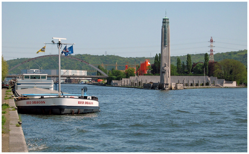 Le Canal Albert à son origine : Liège Description Le Canal Albert à son origine : Liège Date1 May 2005SourcePhoto prise par un privéAuthorJacques RenierPermission (Reusing this file) libre diffusion mais citer l'auteur Le Canal Albert à son origine : Liège